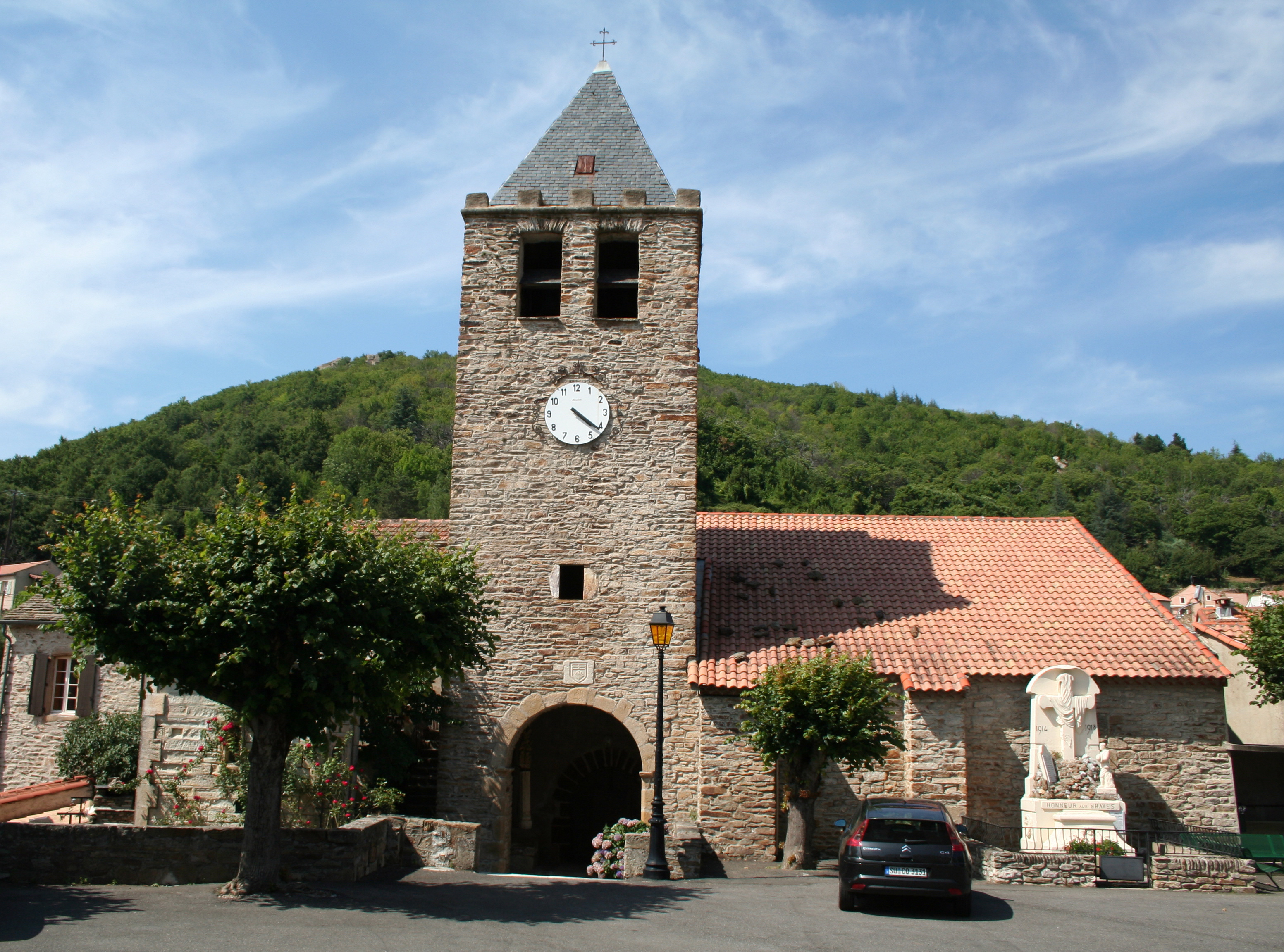 Saint-Vincent-d'Olargues (Hérault) - église Saint-Vincent et monument aux morts.